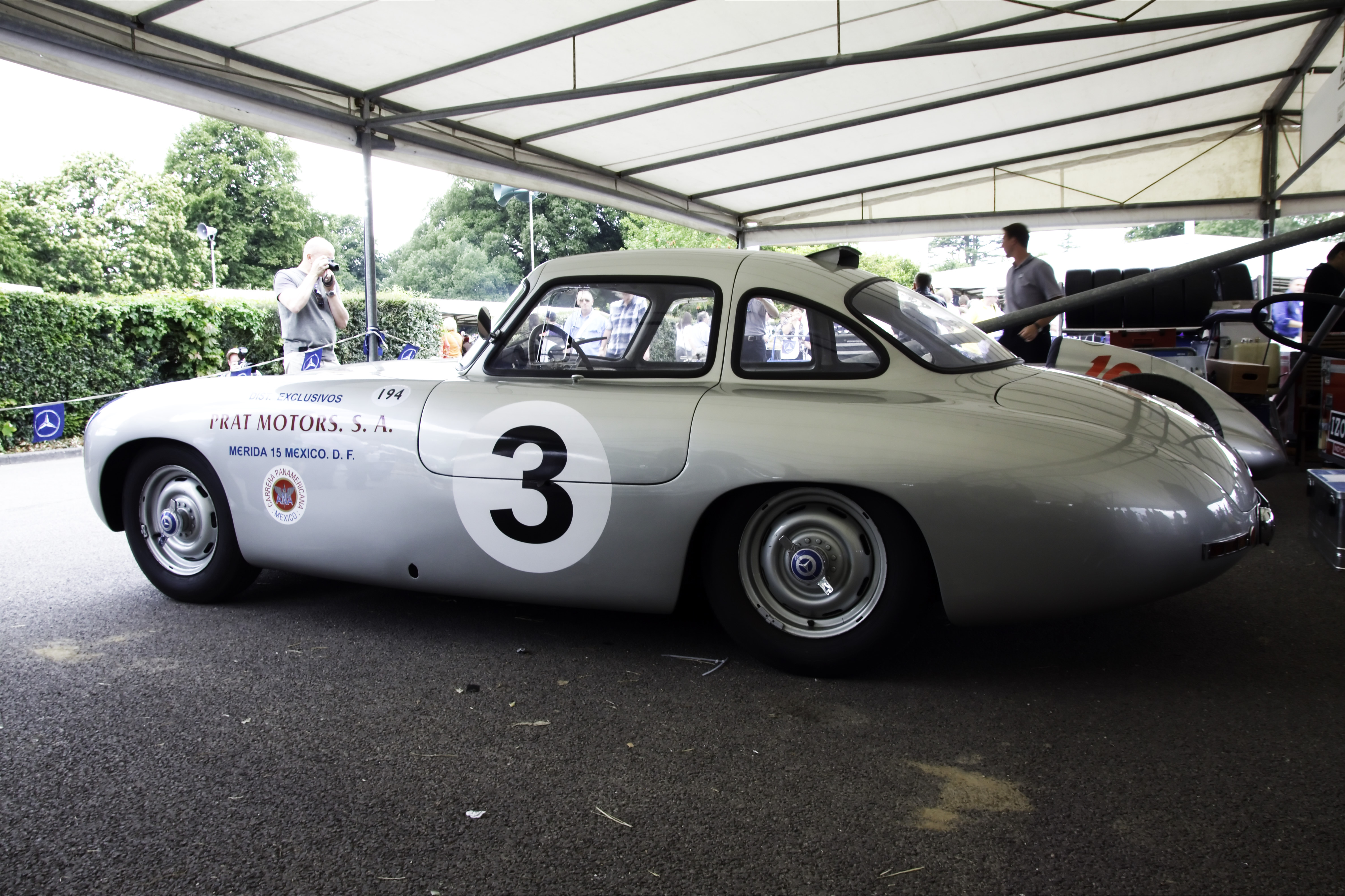 Mercedes 300SL